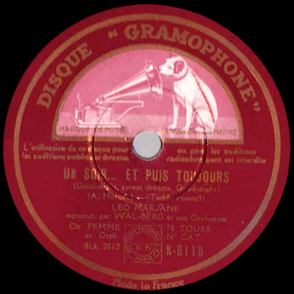 Léo Marjane, 1938. Étiquette de disque 78 Tours, Un soir… et puis toujours - Gramophone - La voix de son Maître, référence K-8116 mx. OLA 2512